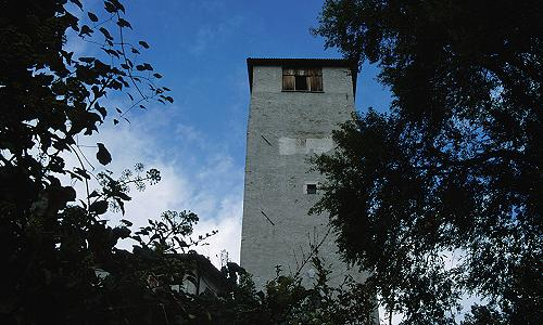 Feltre, la torre del Castello di Alboino (Campanòn)